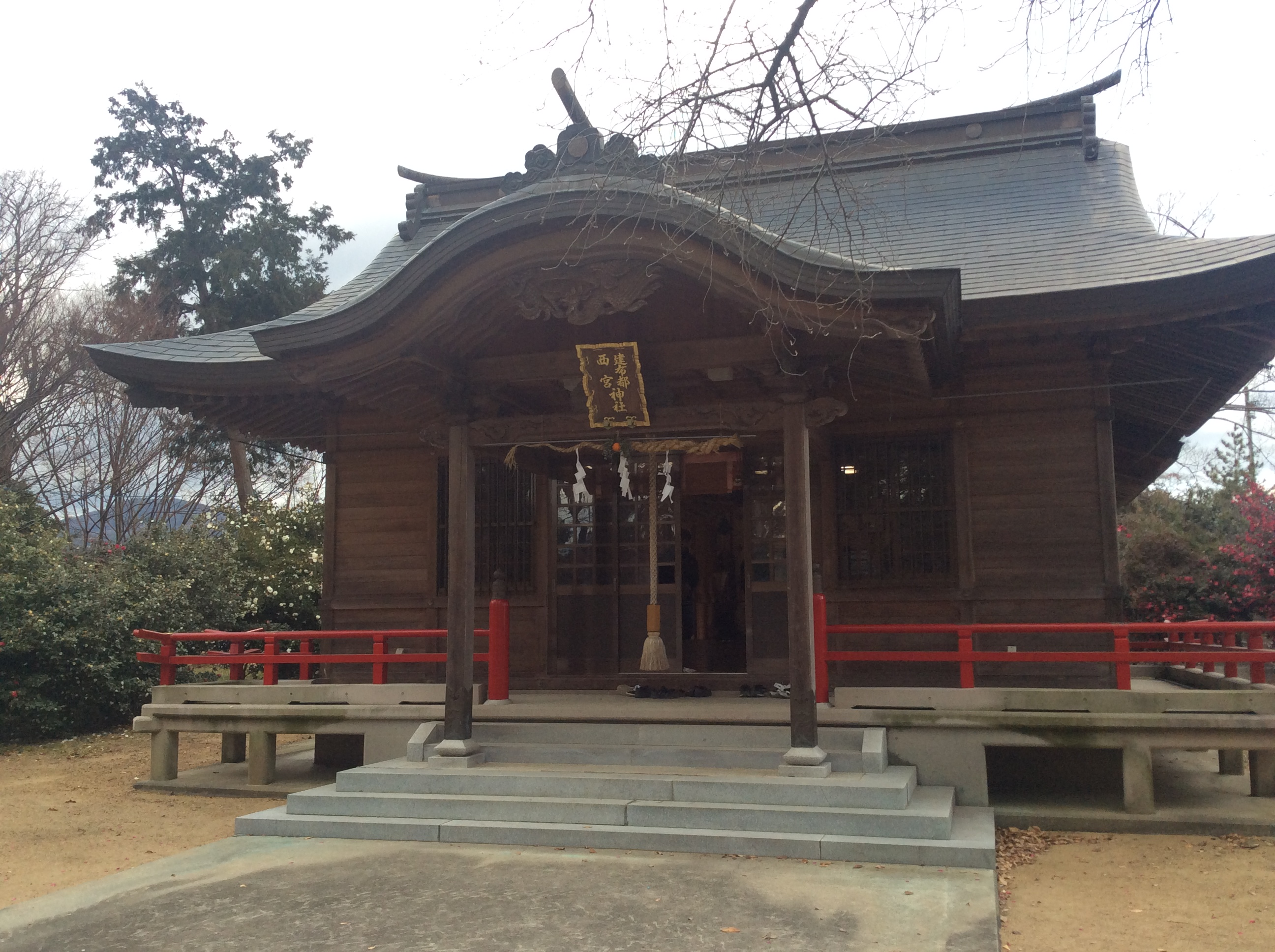 建布都西宮神社（阿波市土成町）